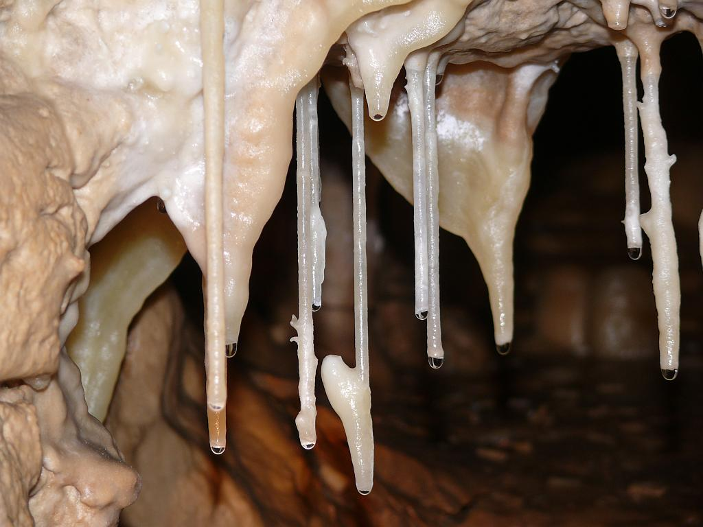 Sinterröhrchen, teilweise als Excentriques ausgebildet